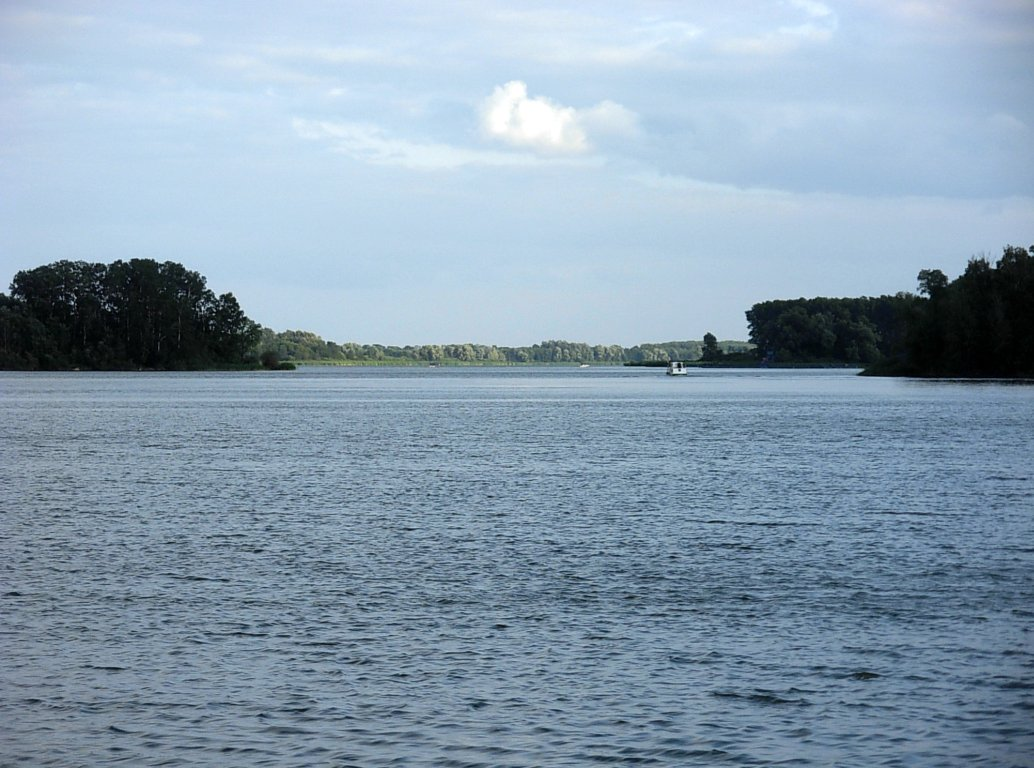 Jezioro Gopło